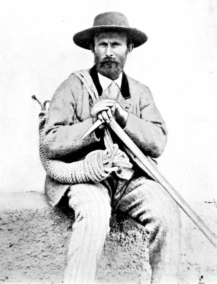 Ambros Supersaxo vers 1890